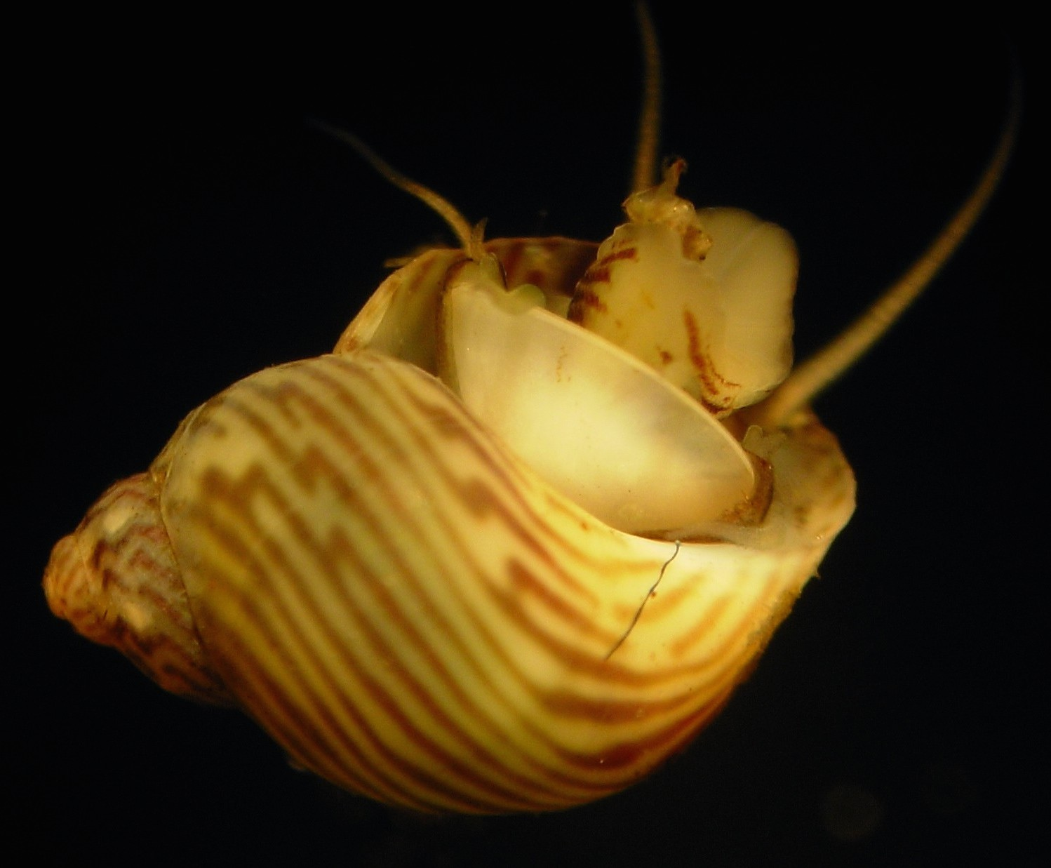 Tricolia pullus en cours d'extension hors de sa coquille